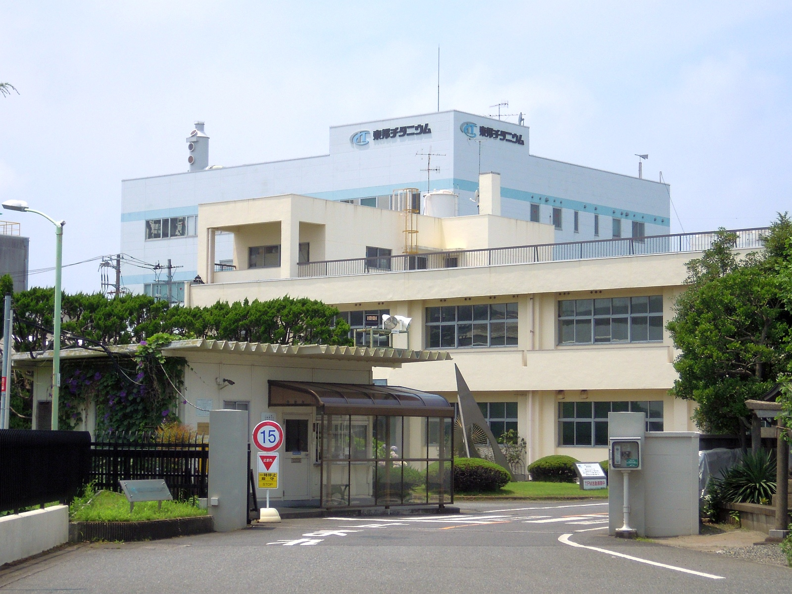 神奈川県茅ケ崎市にある東邦チタニウム株式会社の本社・茅ヶ崎工場社屋を正面入口付近から